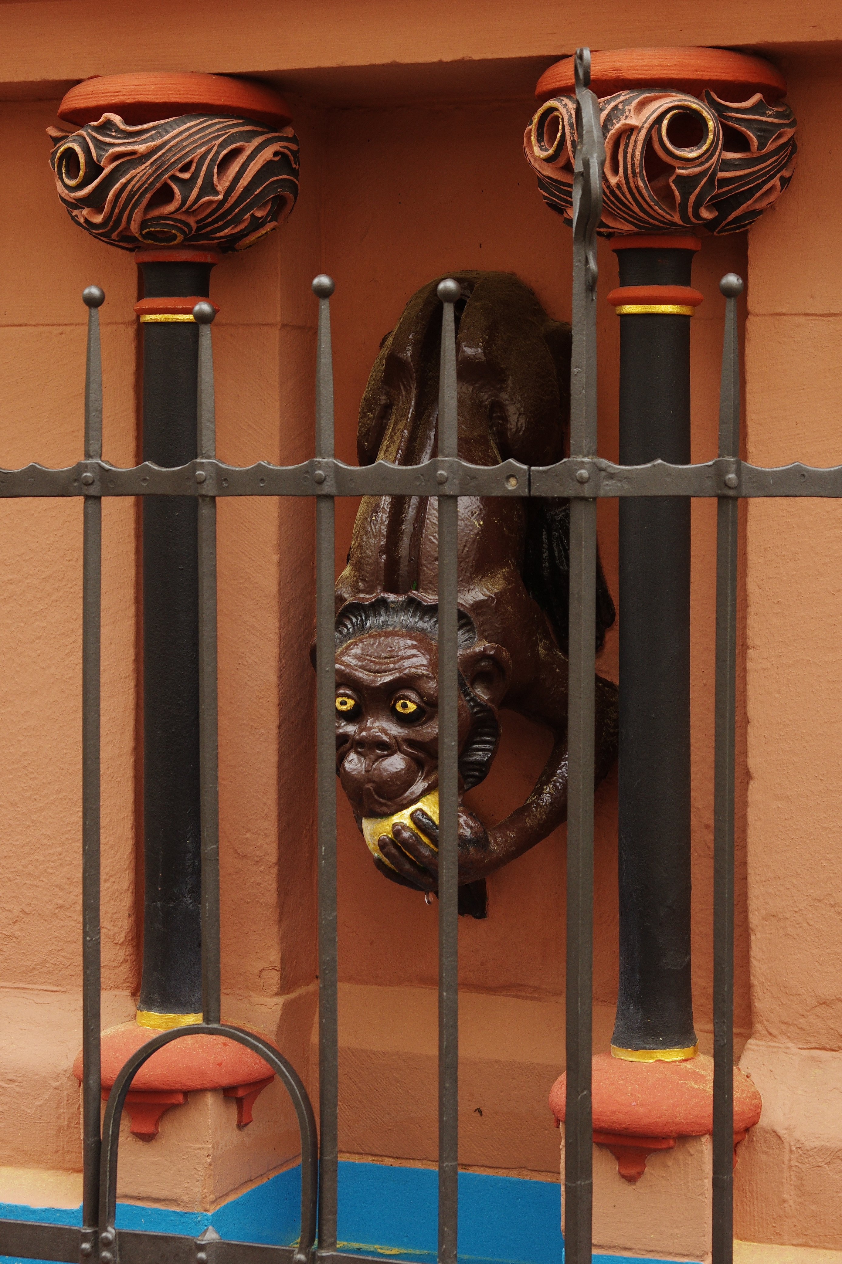 Der Affenbrunnen in der Gauchstraße